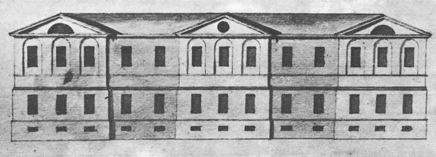 Беларуская (тарашкевіца): Менск (Miensk), Траецкая гара (Trajeckaja hara). Траецкі манастыр базылянак